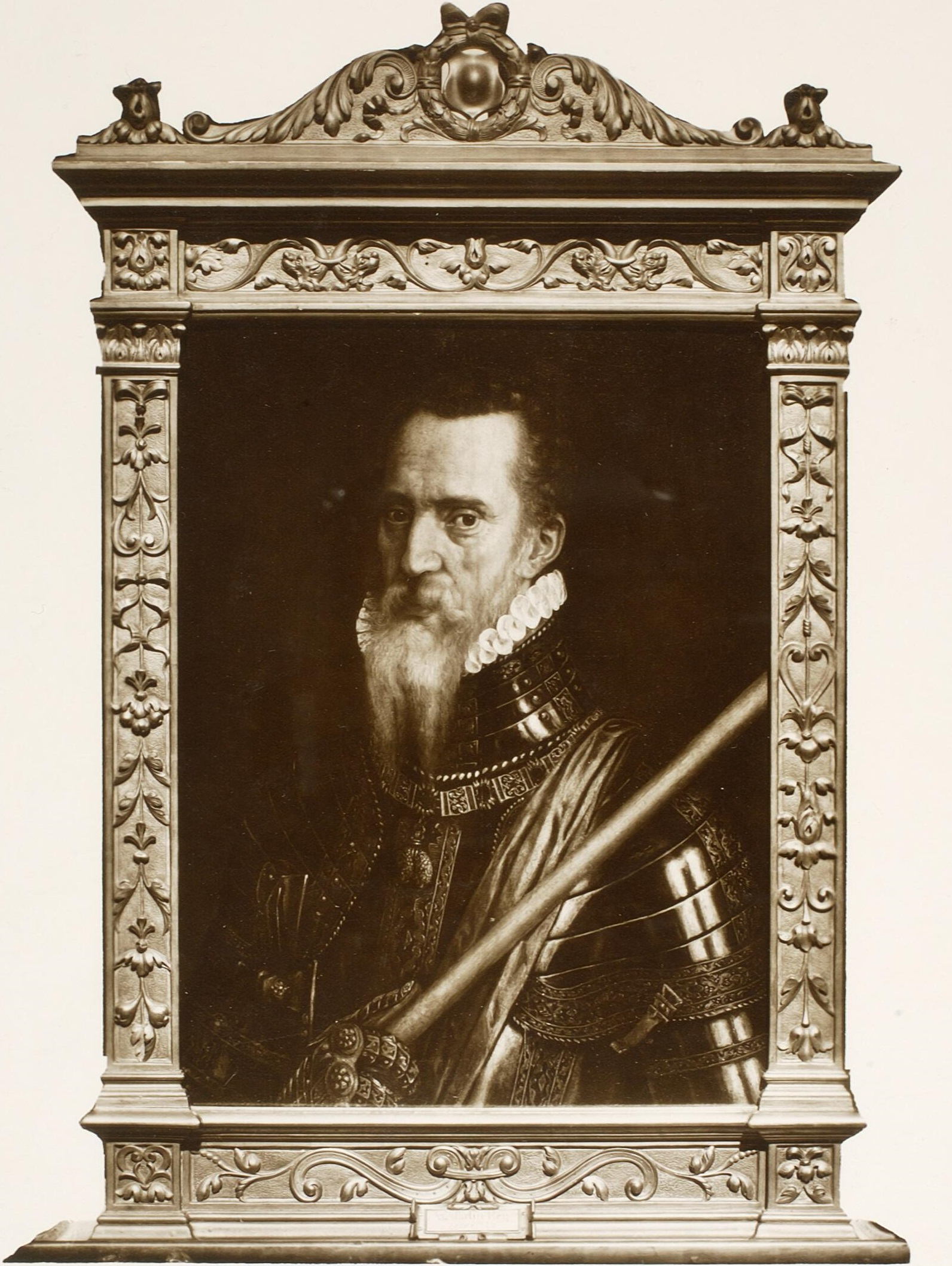 Portret van Ferdinand Alvarez de Toledo, hertog van Alva. 1568. oil on panelmedium QS:P186,Q296955;P186,Q287,P518,Q861259. Height: 64 cm (25.1 in); Width: 49 cm (19.2 in) dimensions QS:P2048,64U174728;P2049,49U174728. Madrid, privéverzameling hertog van Alva.